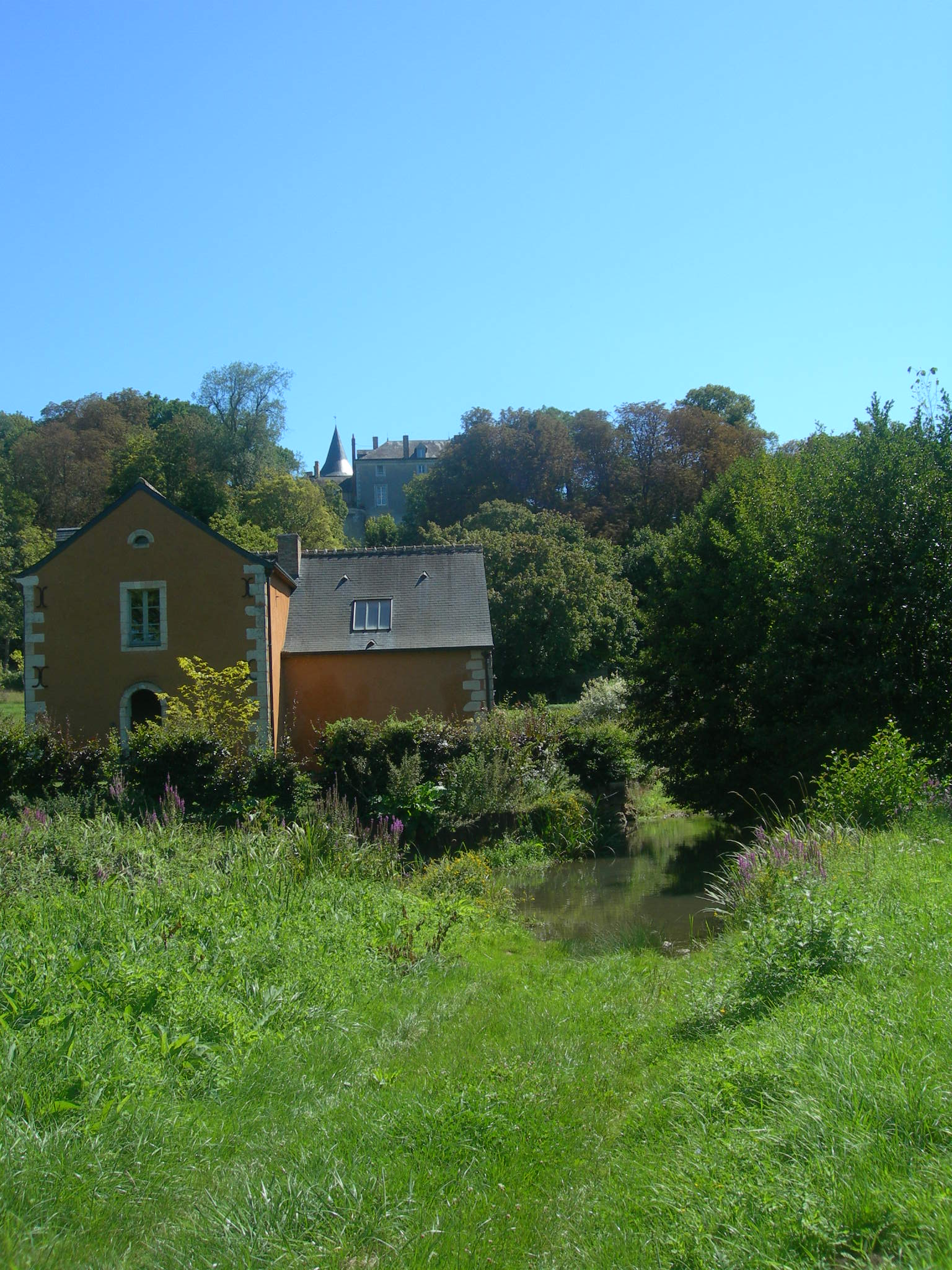 Moulin et château de Courcillon